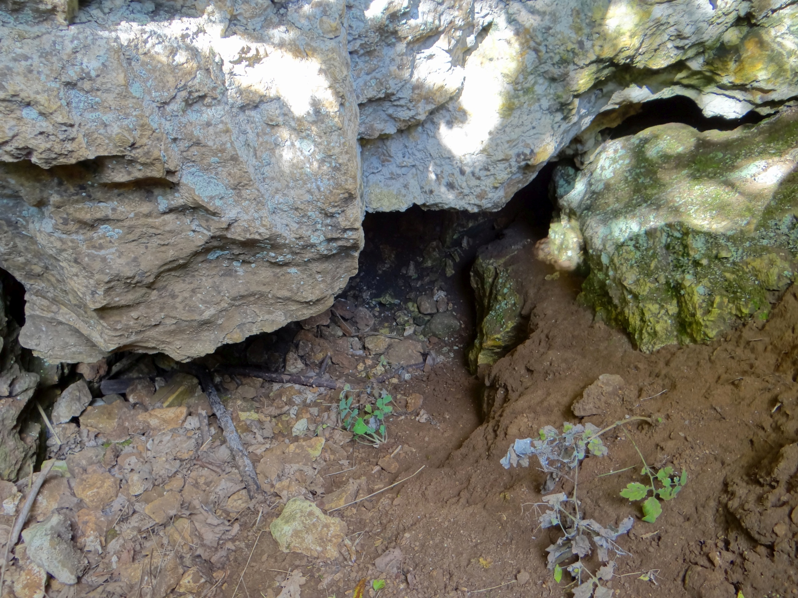 Jaskinia pod Nyżą